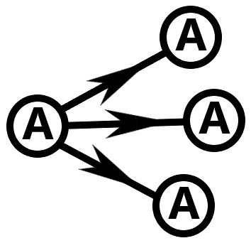 Amostra